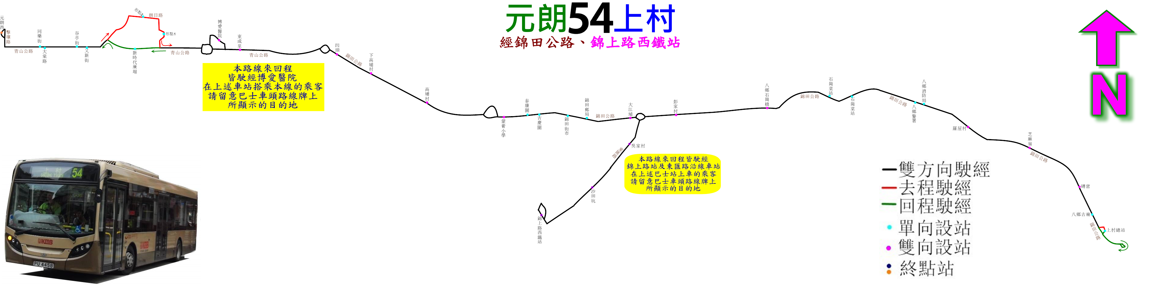 中文（香港）: 九巴54路的走線圖